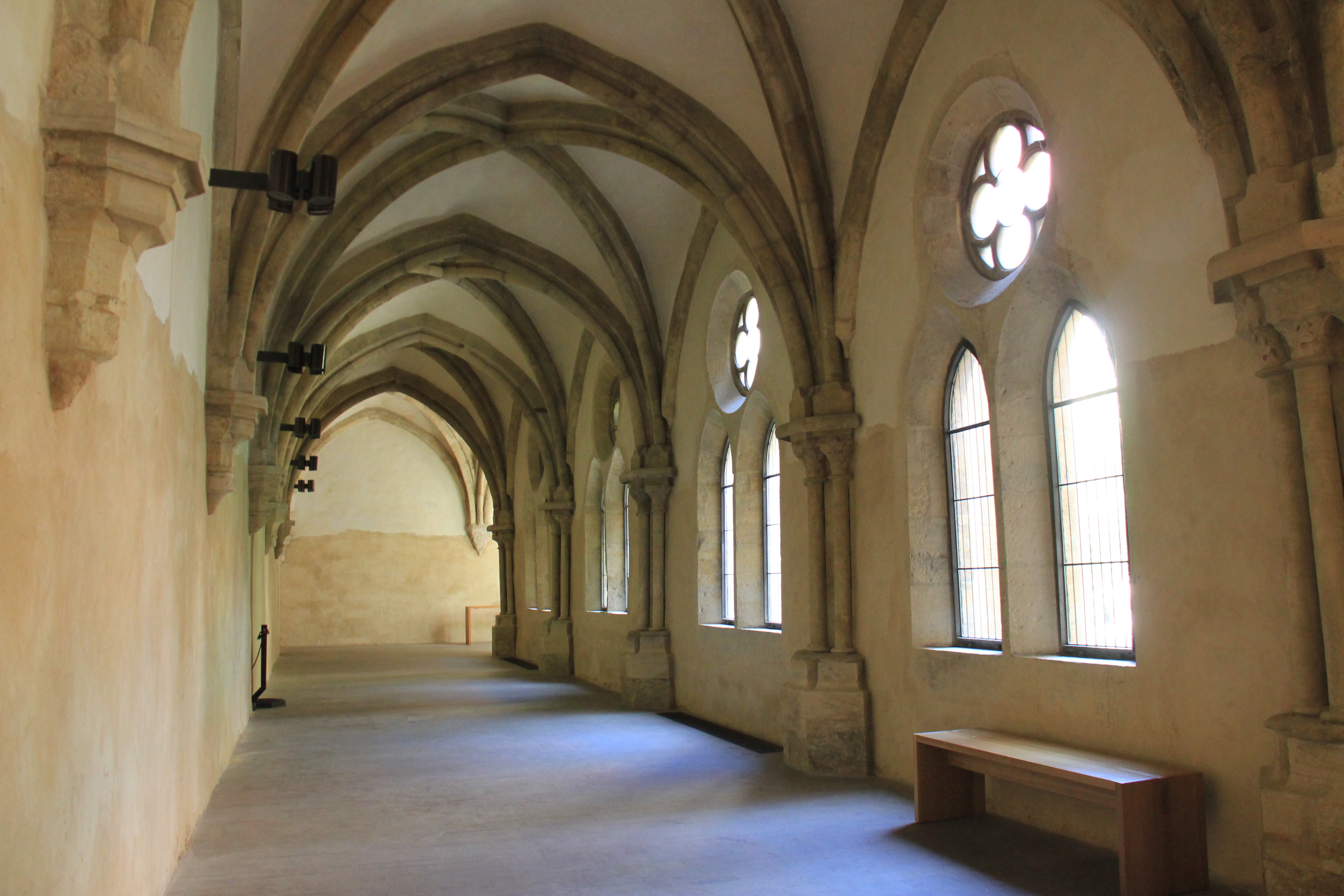 Клуатр